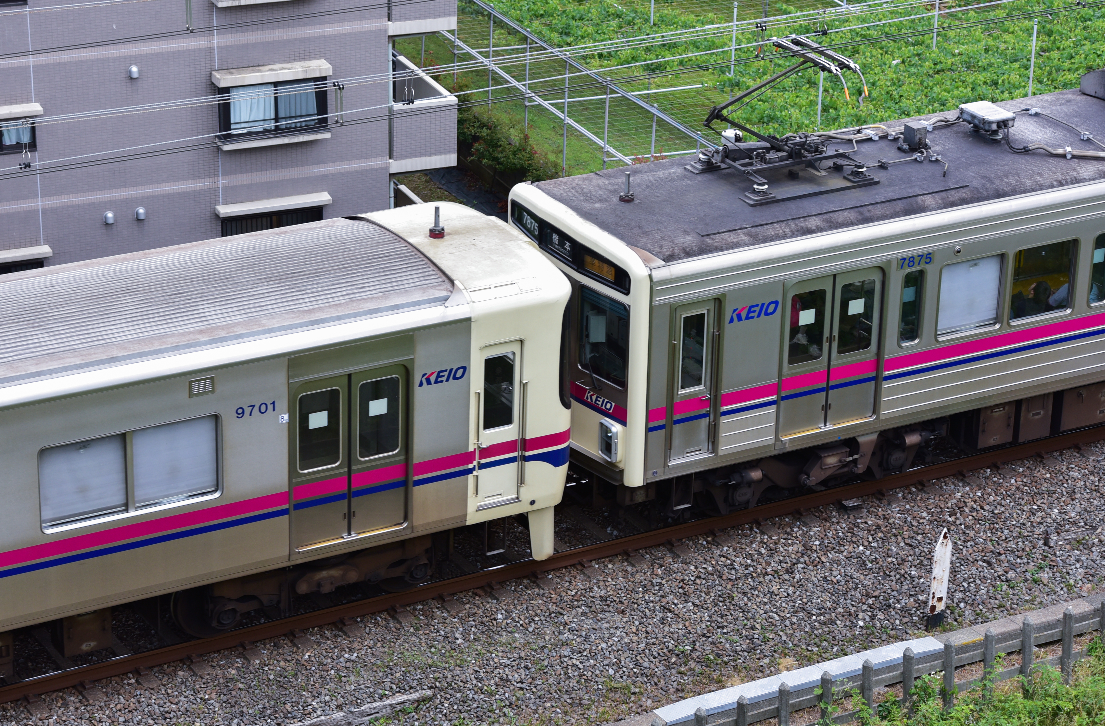 京王9000系と7000系の連結運転。（8＋2準特急運用）。稲城～京王よみうりランド間。